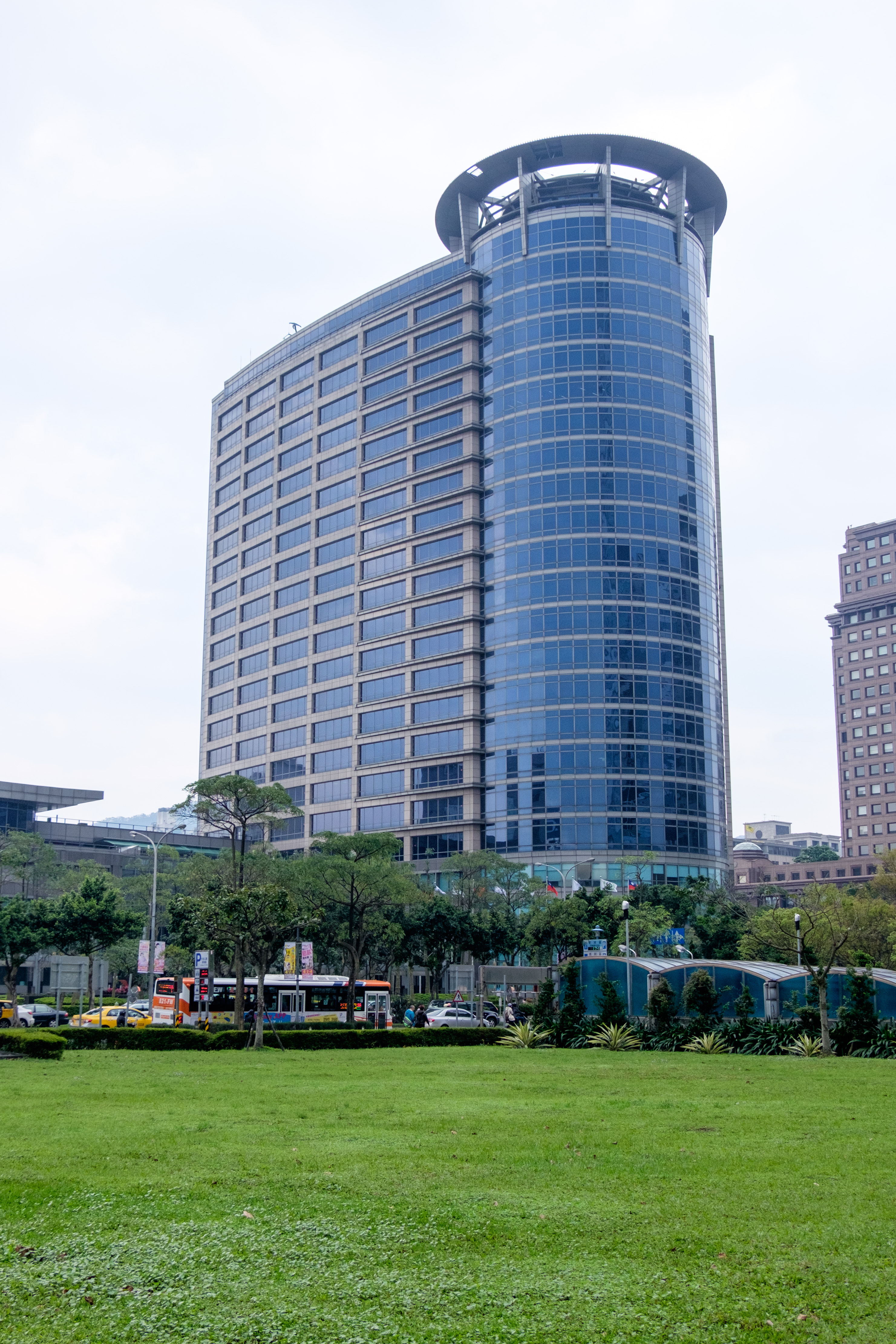 中文（台灣）: 從忠信廣場東南遠眺中油總部大樓。